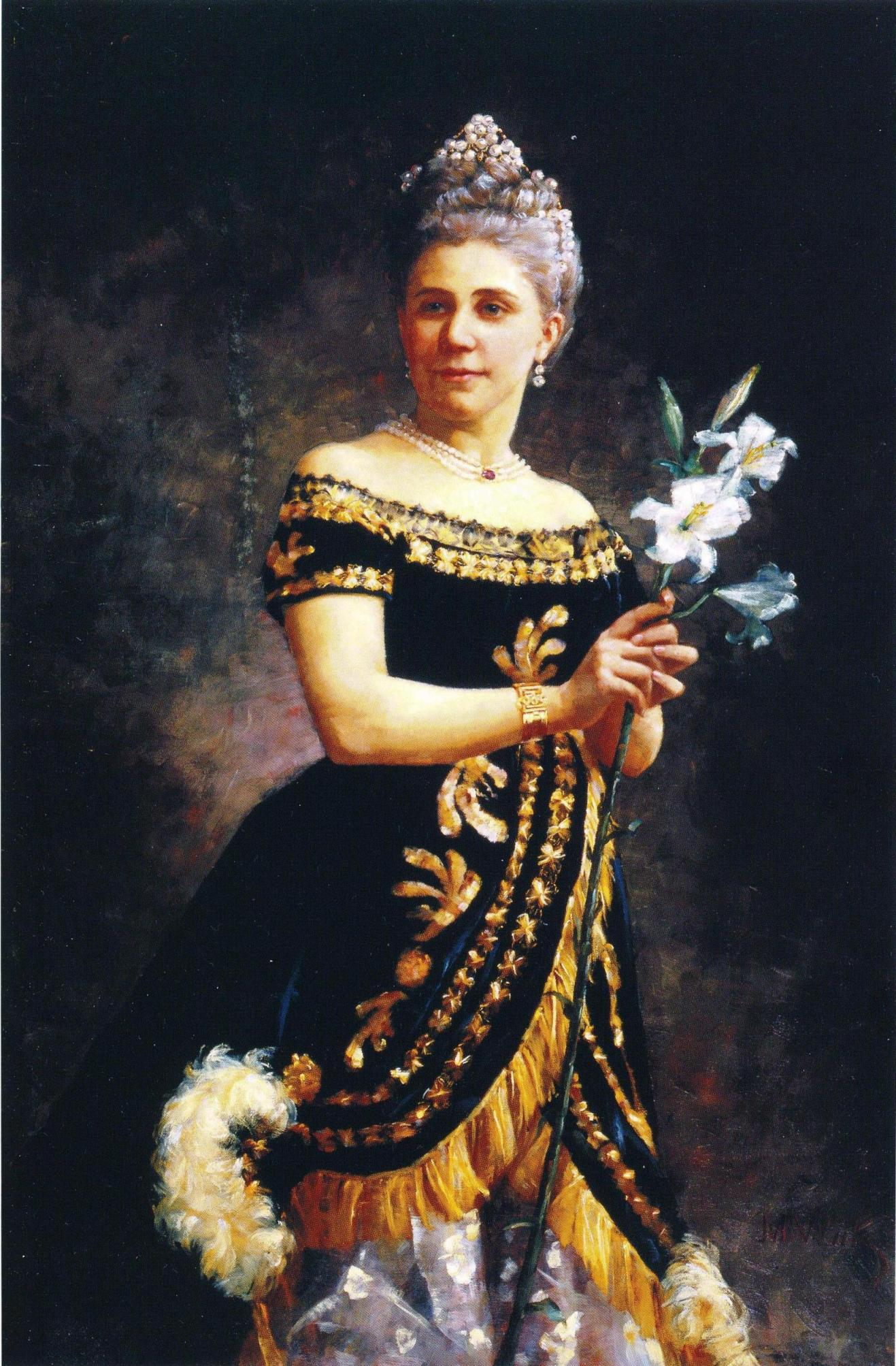 Oopperalaulaja Ida Basilier-Magelssen (1846–1928) Mignon-oopperan Philinen rooliasussa.